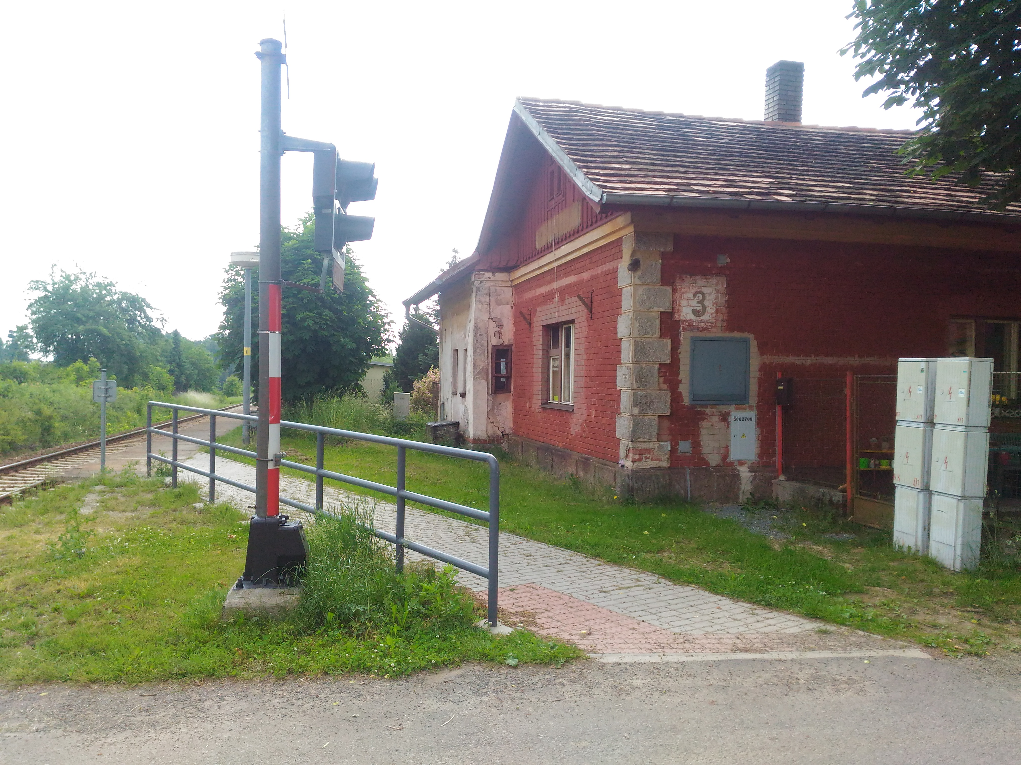 Nasavrky, okres Tábor, Česká republika